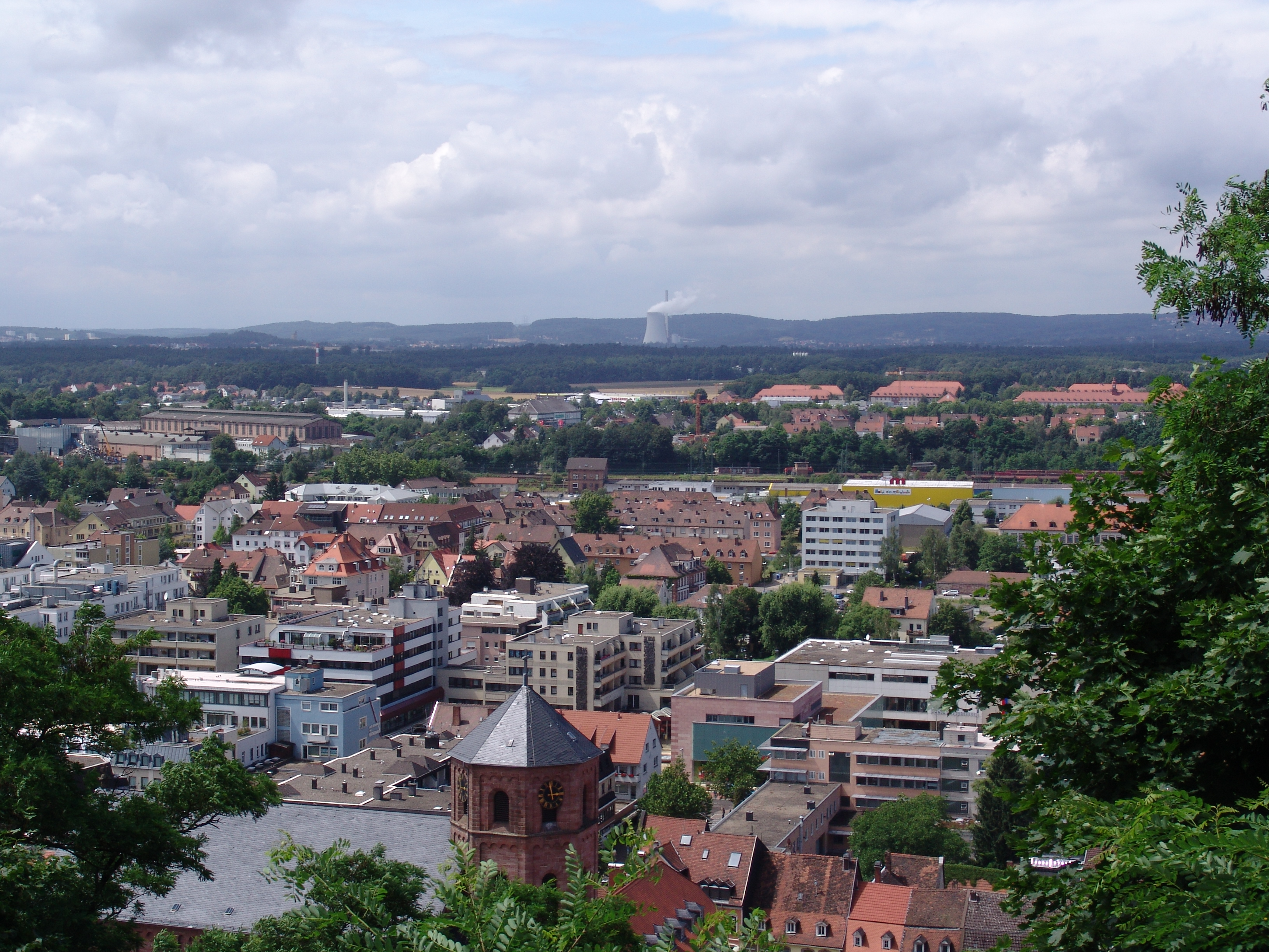 Homburg Saar weiter hinten das Kraftwerk Bexbach